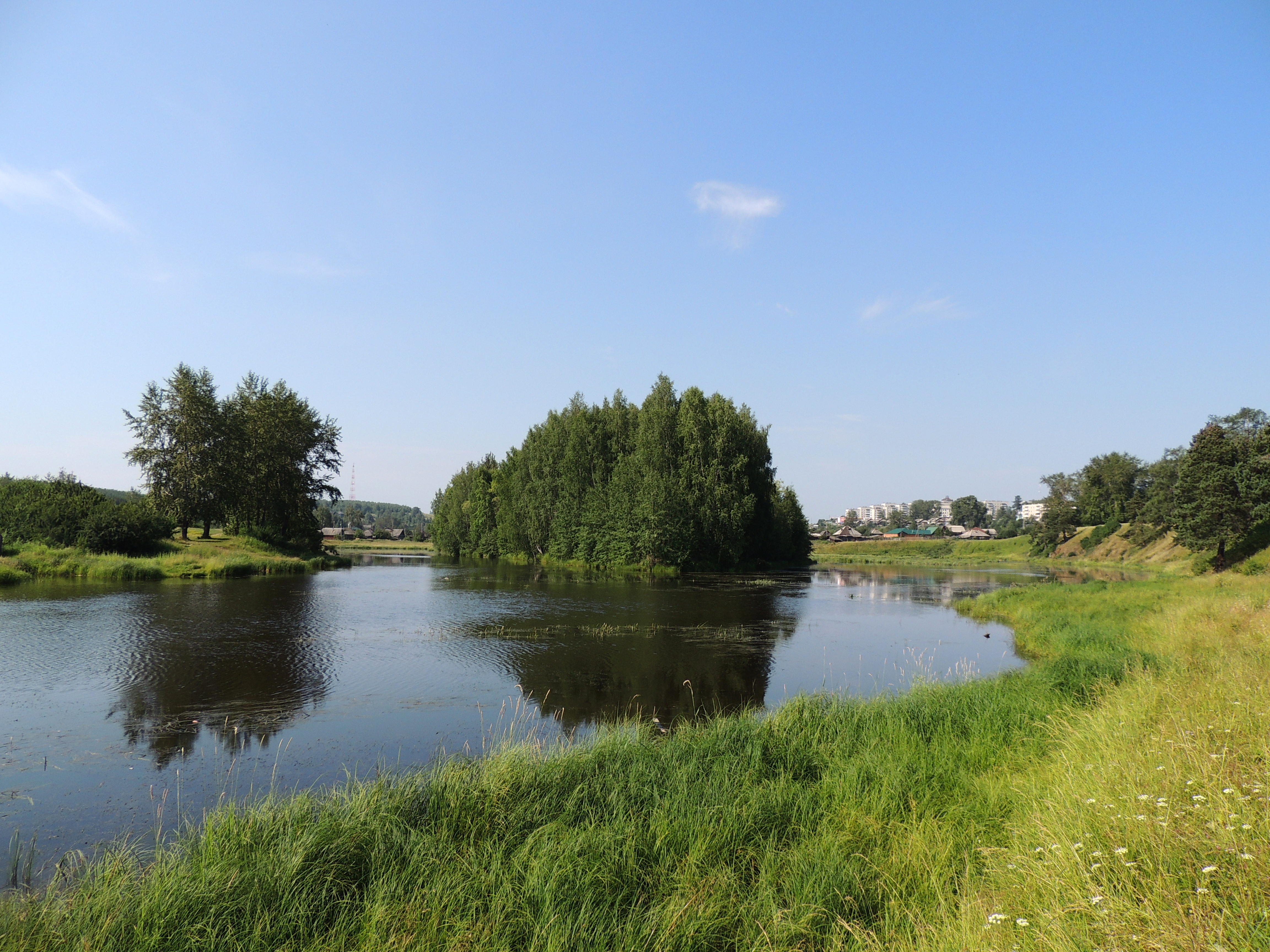 Вид на реку Турья